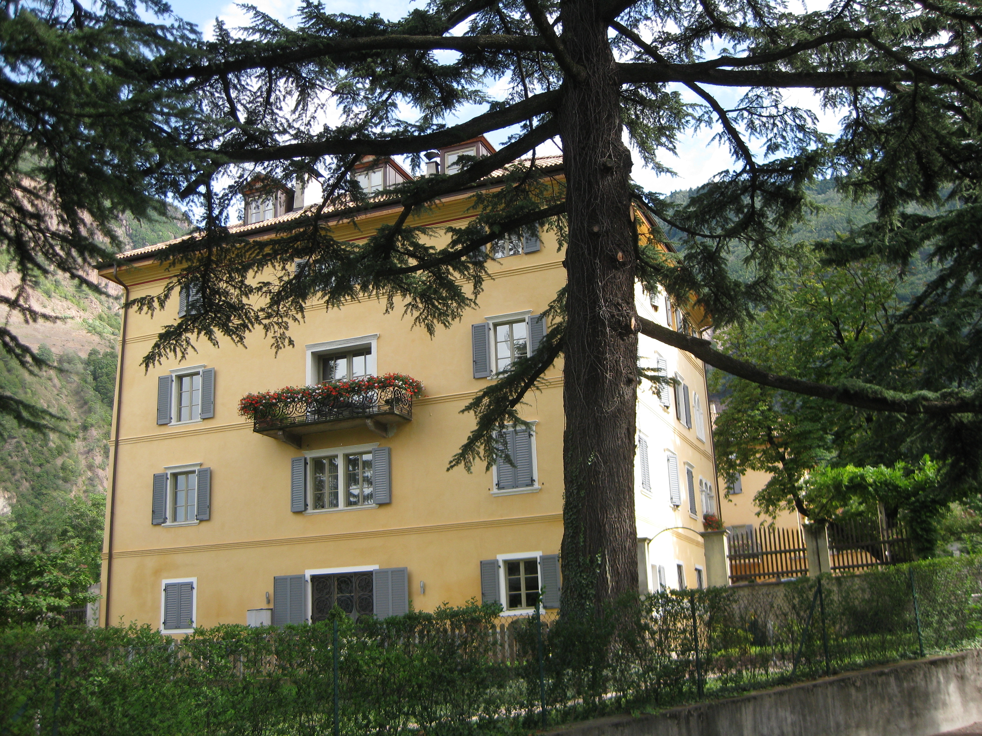 Palais Thomsen-von Ferrari in Branzoll